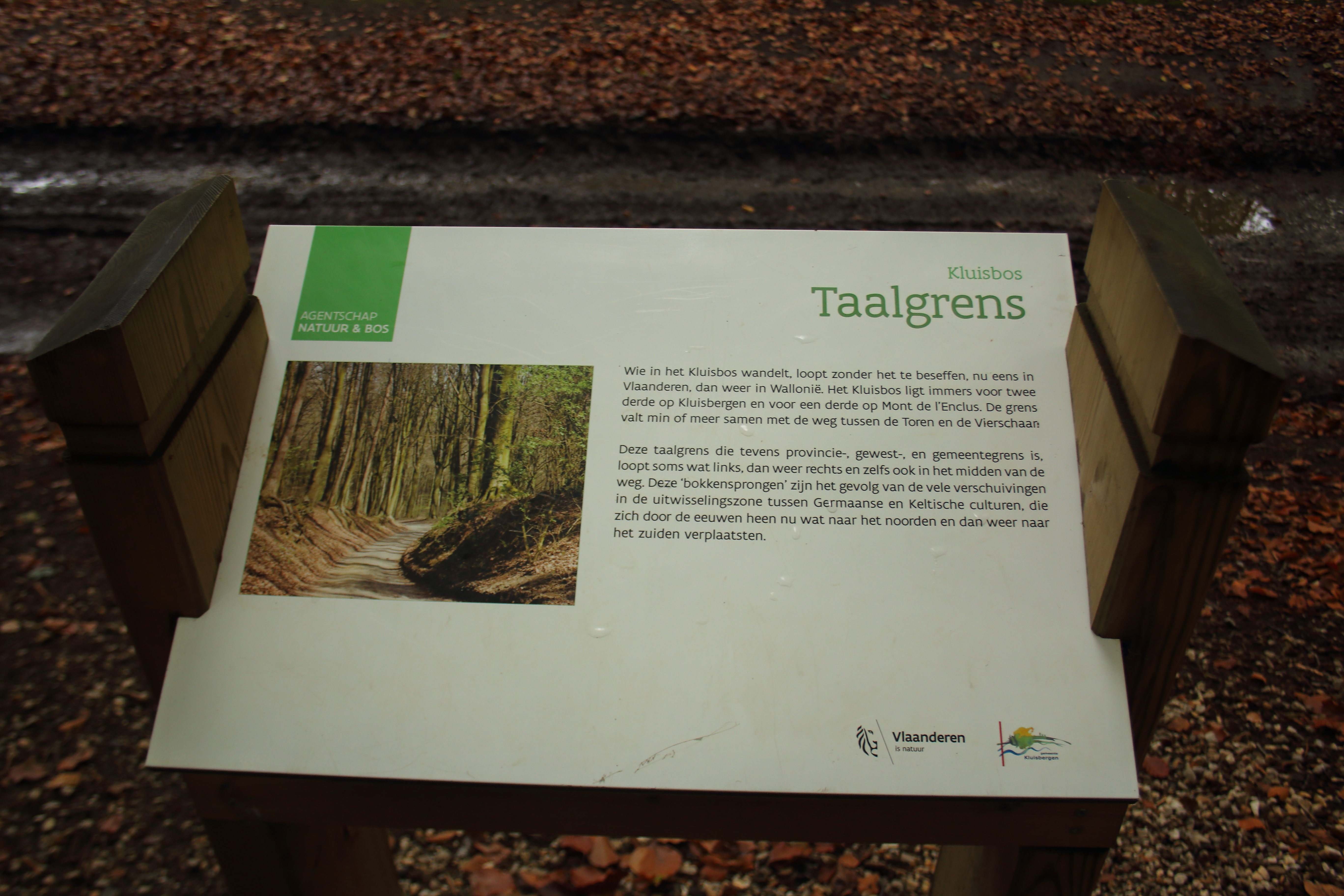 Kluisbos, Kluisbergen, Vlaanderen, België